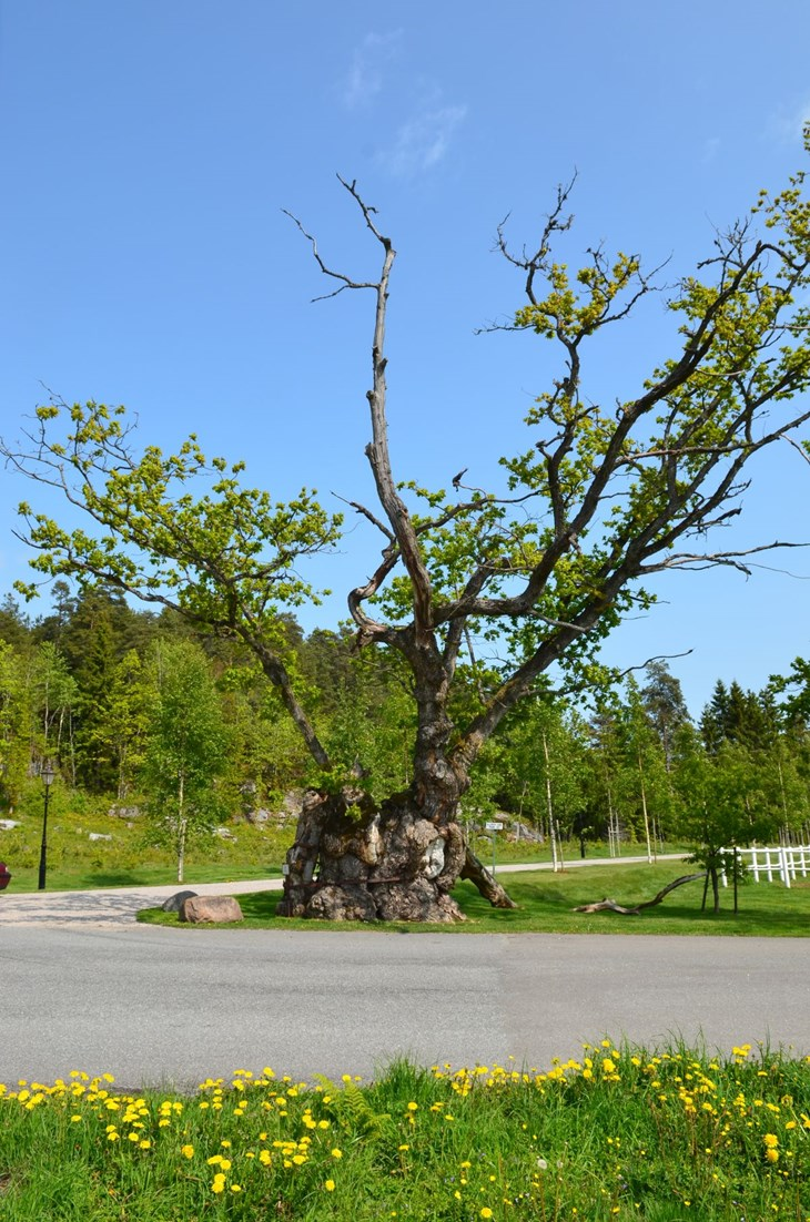 Ullebergeika